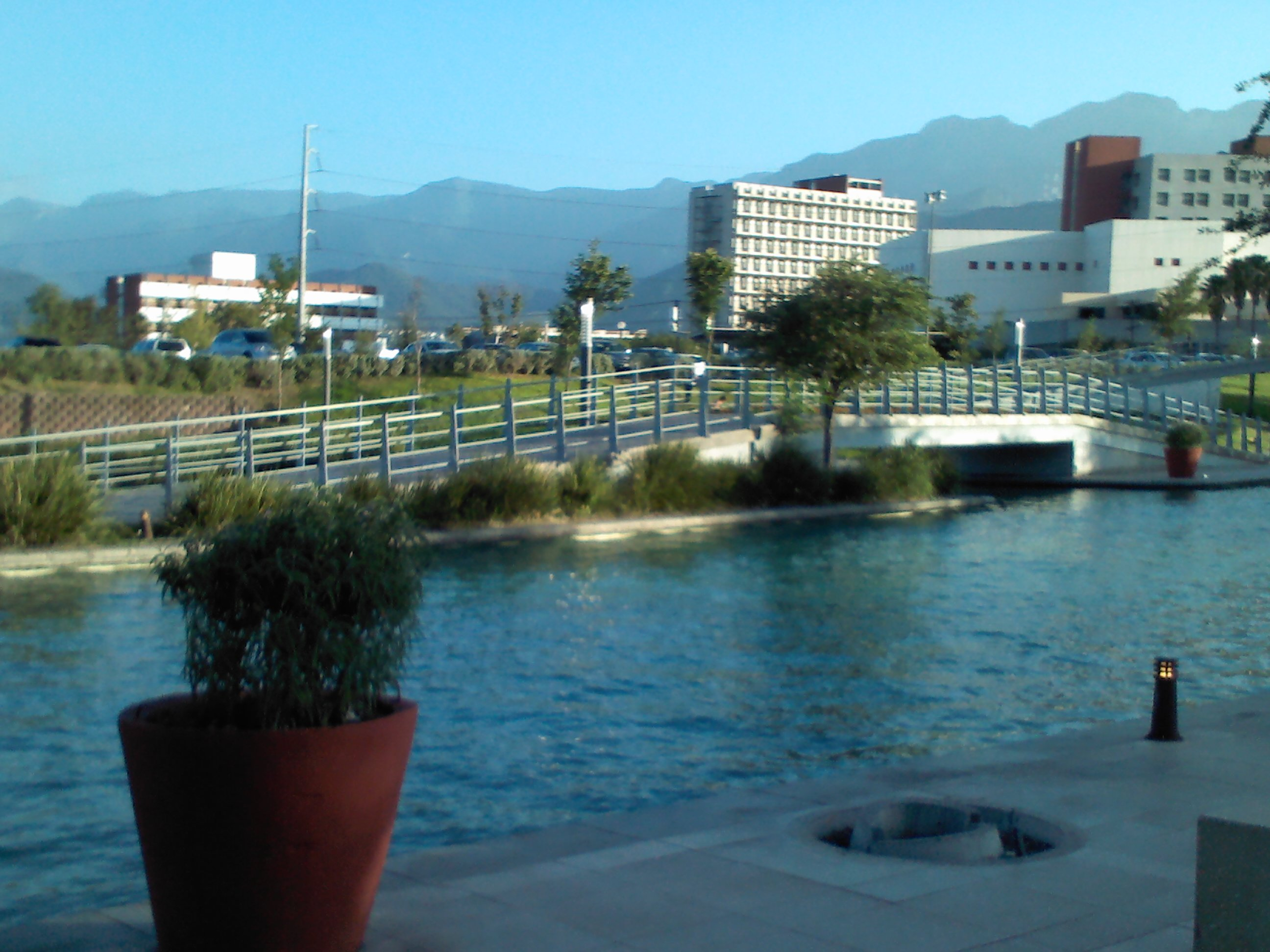 Santa Lucia.